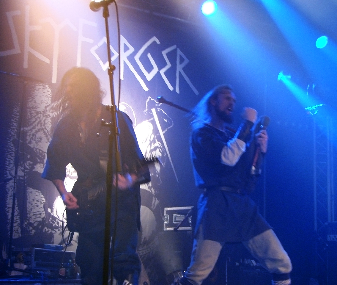 Skyforger au Cernunnos Fest 07, le 16/12/07 à la Locomotive, Paris. Skyforger est un groupe de Pagan Folk Metal letton.